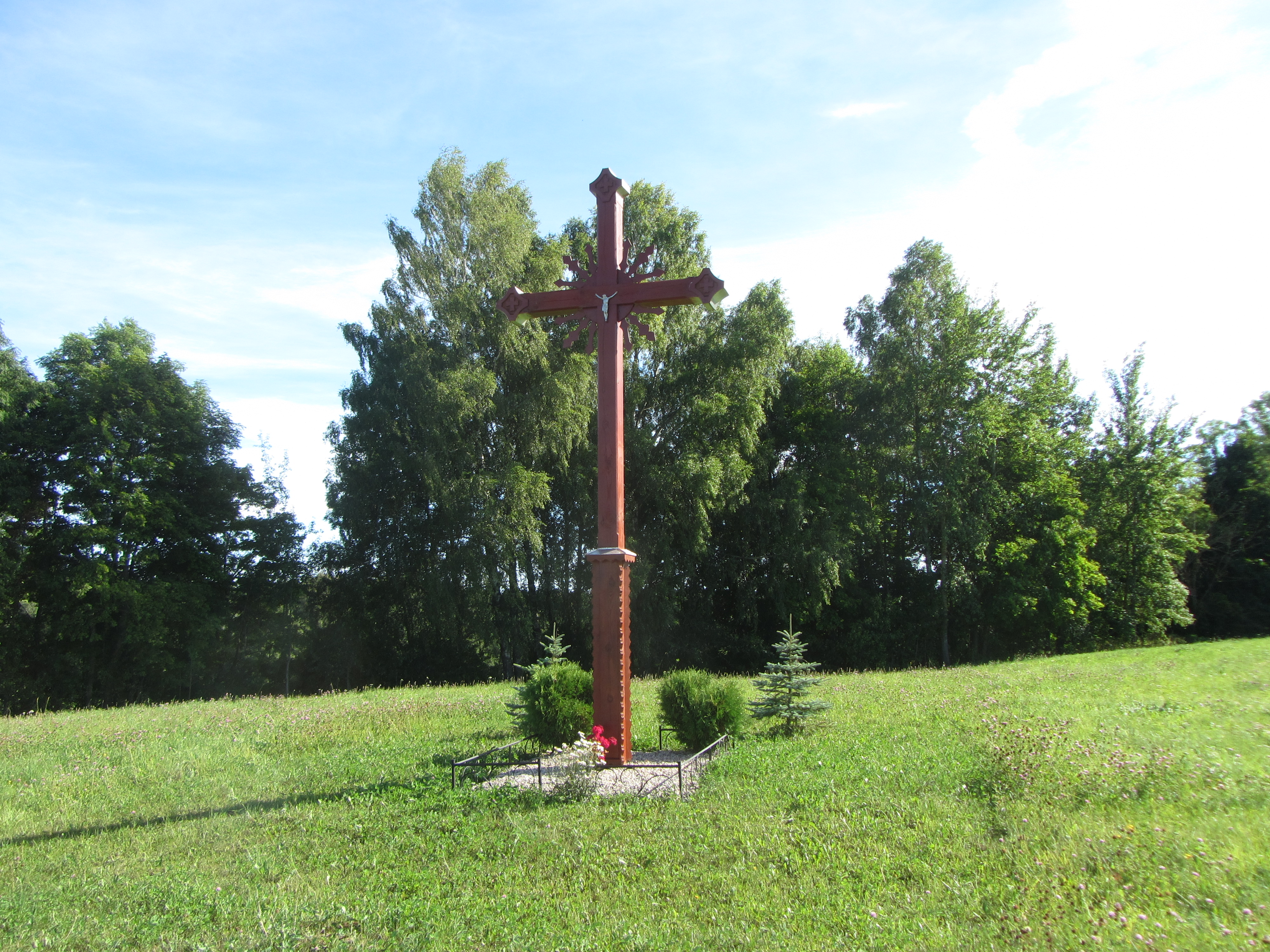 Vaitkūnai 29340, Lithuania